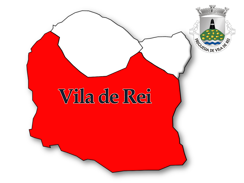 Evolução da População